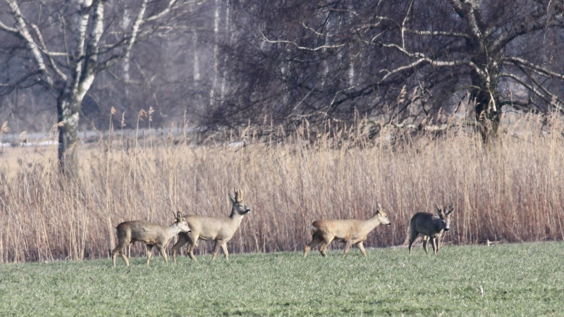 Roe Deer (Capreolus capreolus)